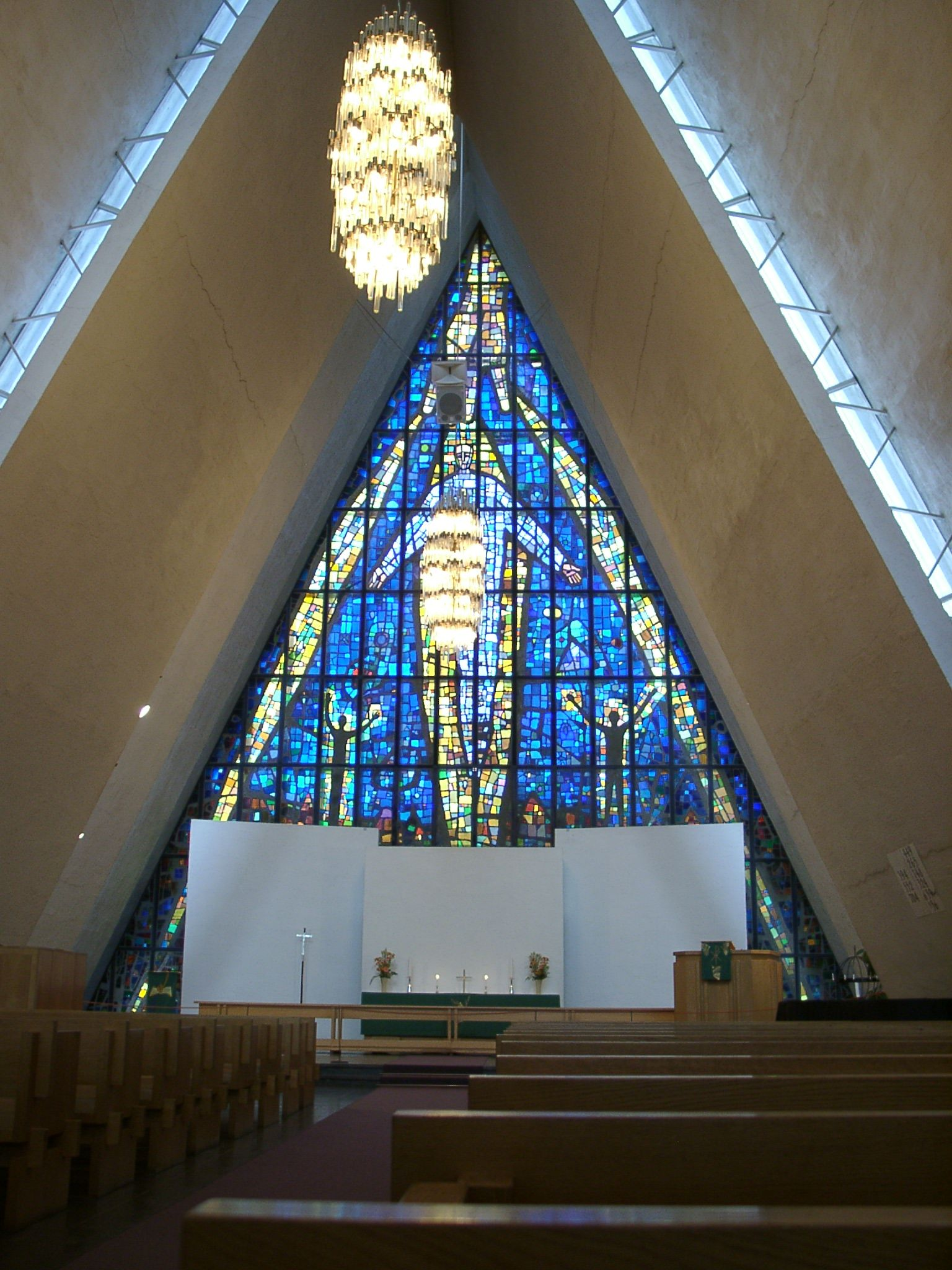 Eismeerkathedrale Tromsø Norway